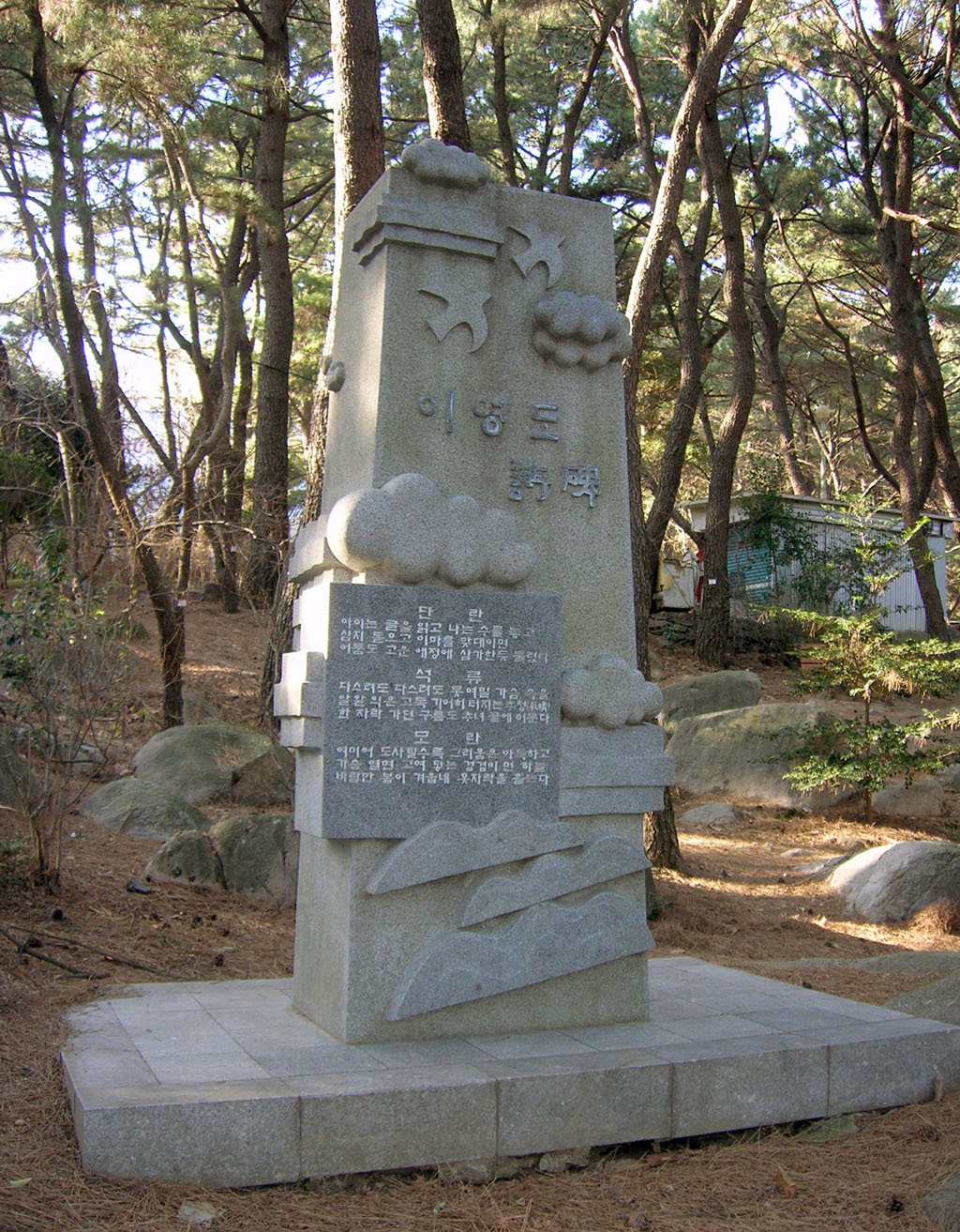 부산 금강공원에 있는 이영도 시비.